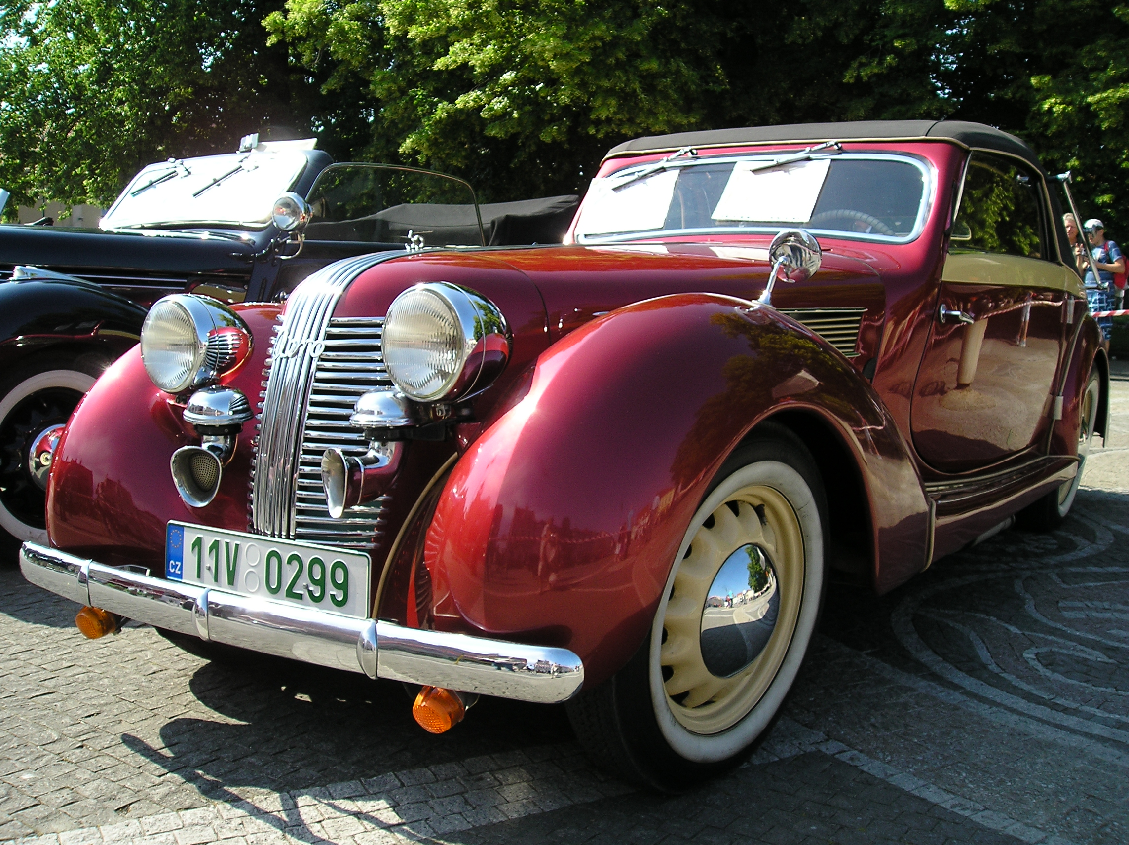 Aero 50 s karoserií Sodomka na festivalu Sodomkovo Vysoké Mýto 2011